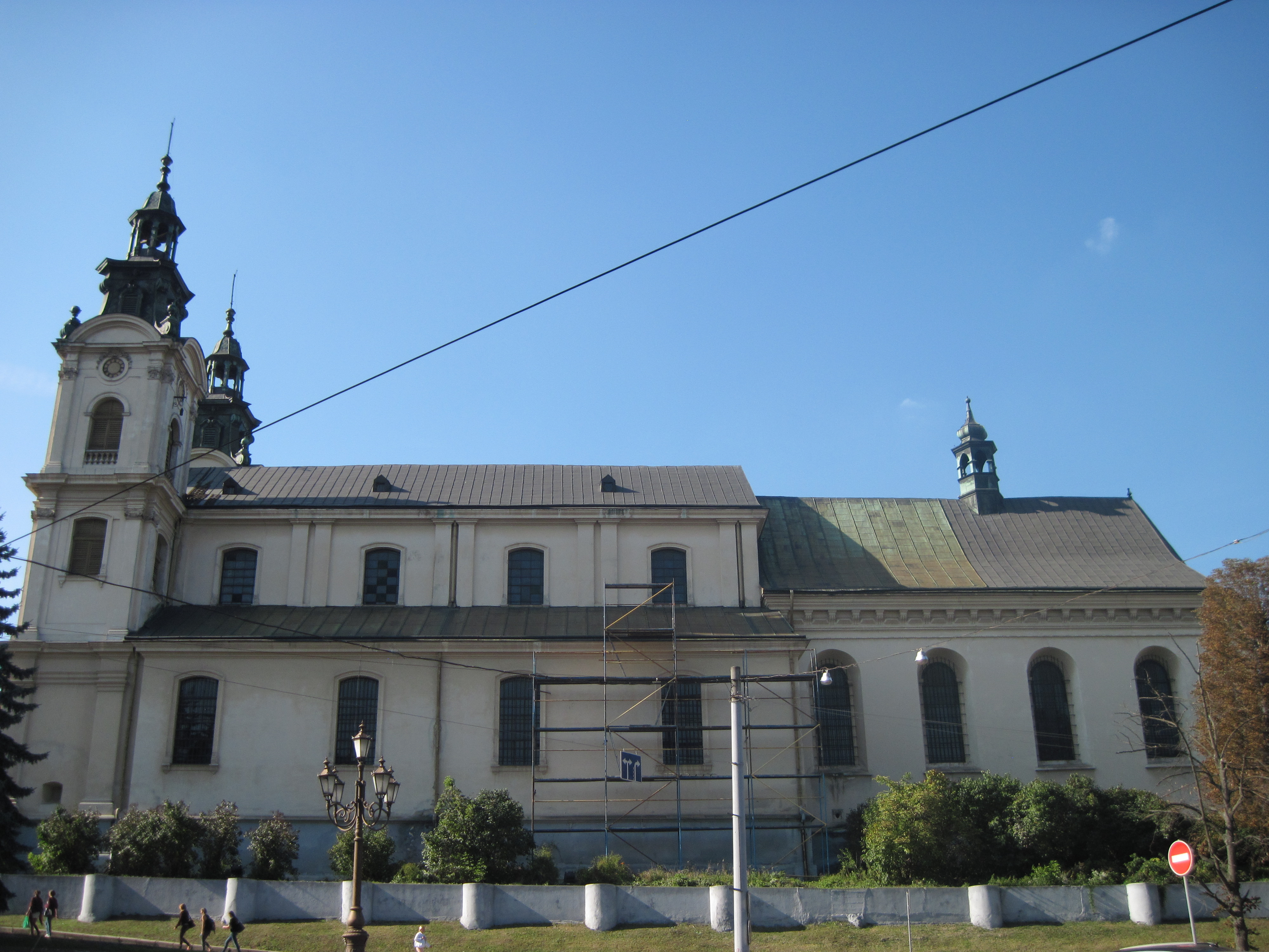 Костел М. М., Львів